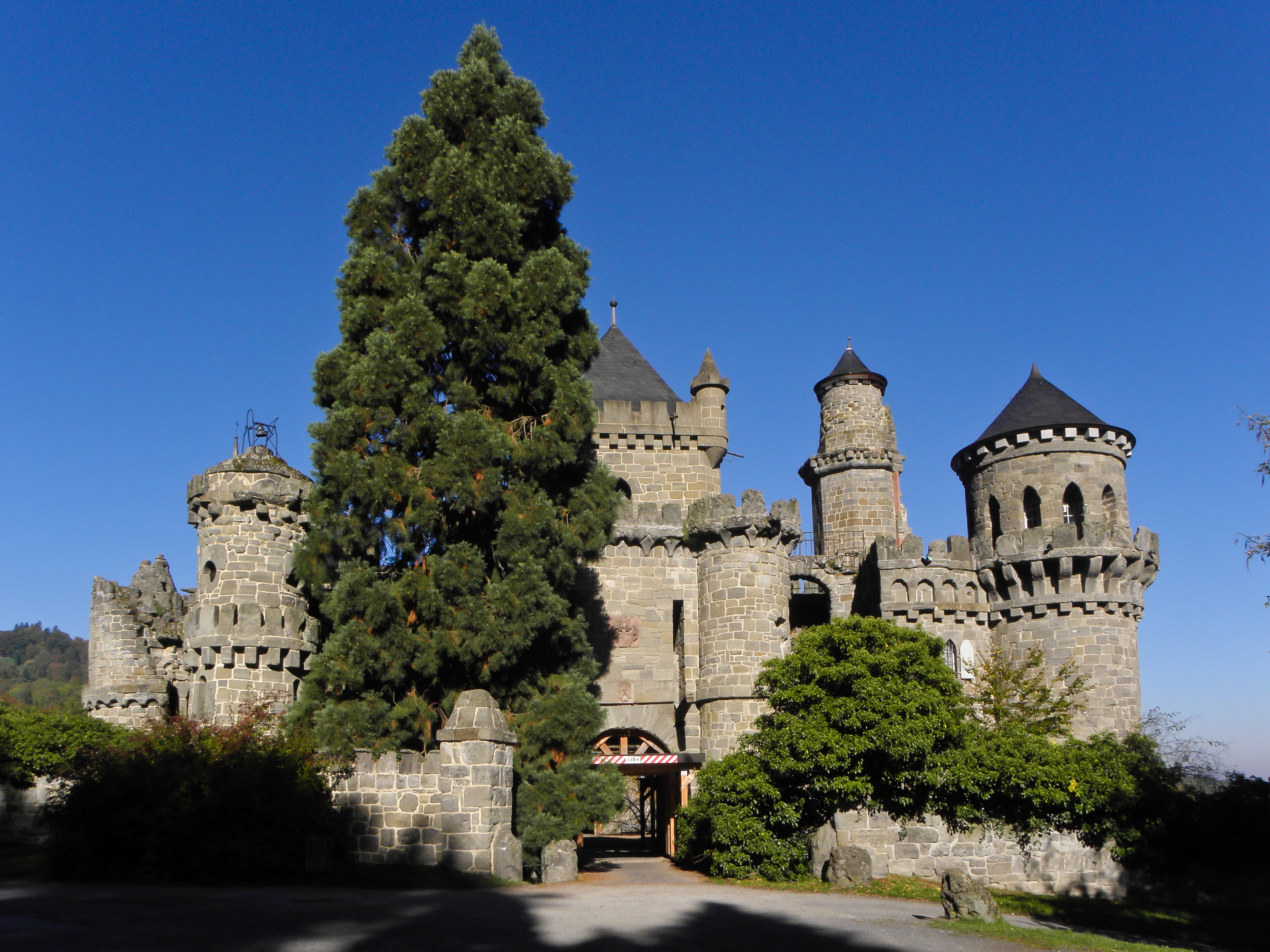 Südeingang der Löwenburg im Bergpark Kassel.